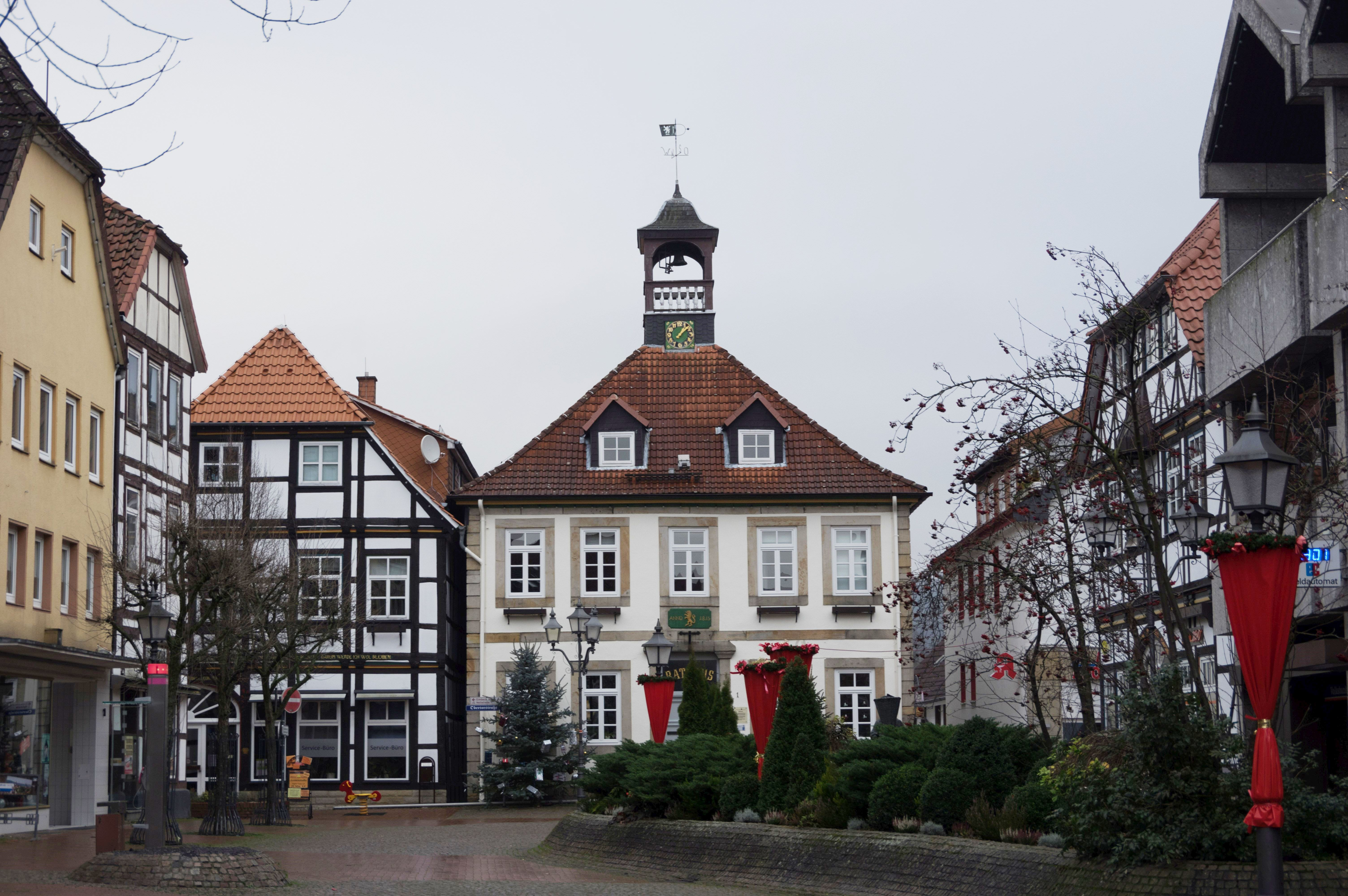 Bad Münder in Niedersachsen. Das Rathaus befindet sich am Markt in einer Fußgängerzone.